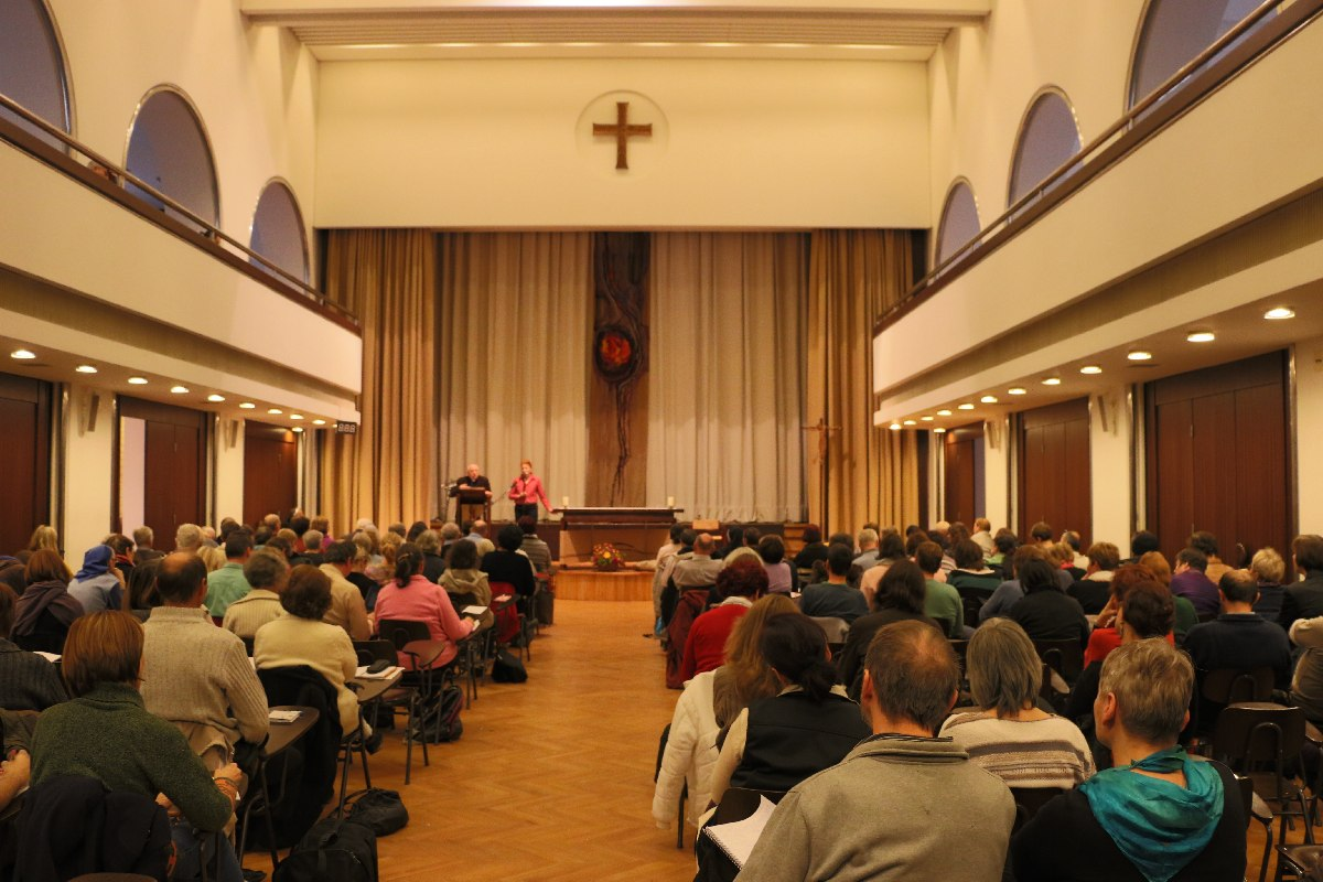 Interiár kostela sv. Vojtěcha v Praze 6 (stav k listopadu 2014)